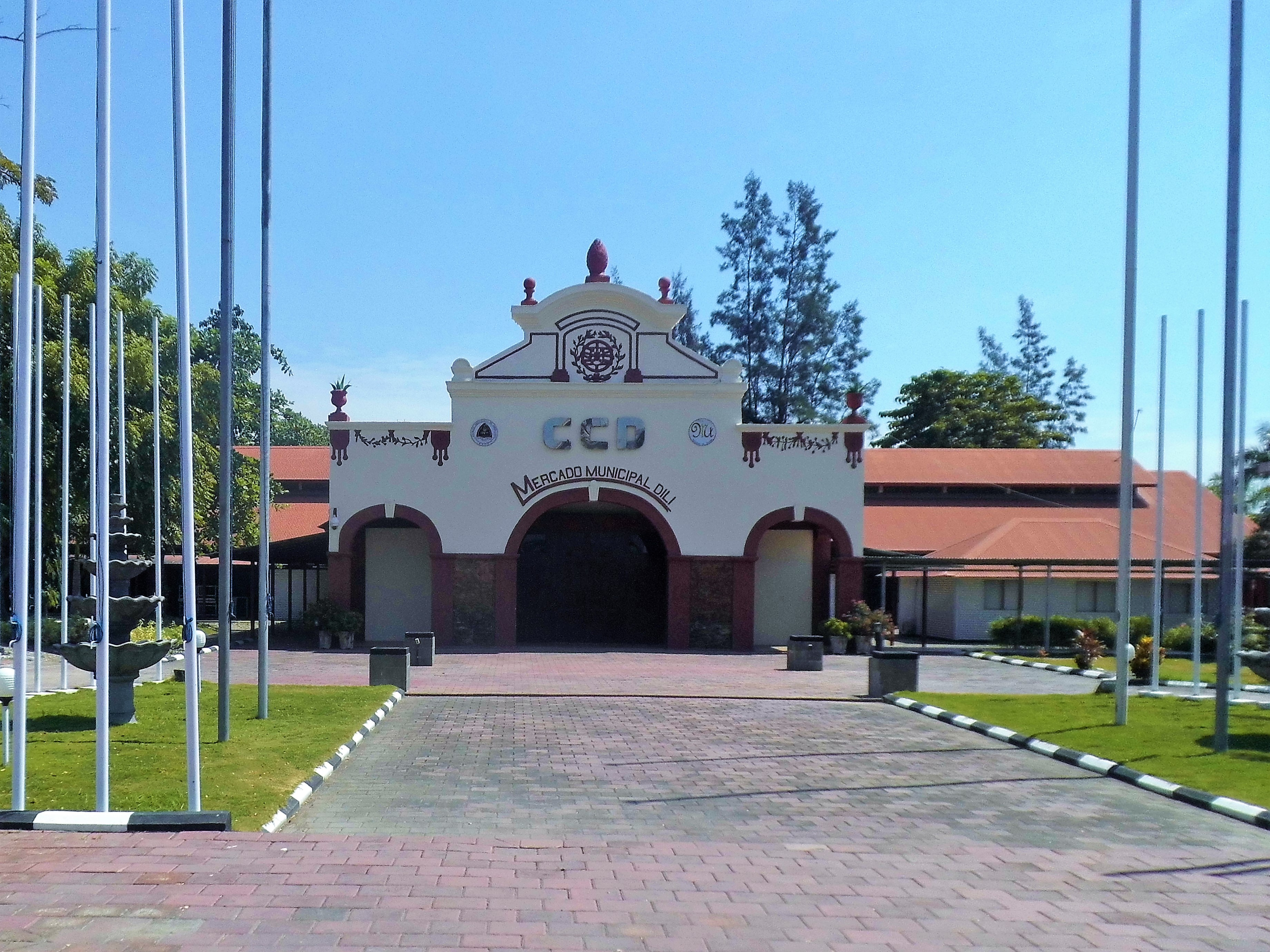 Satadtmarkt von Dili